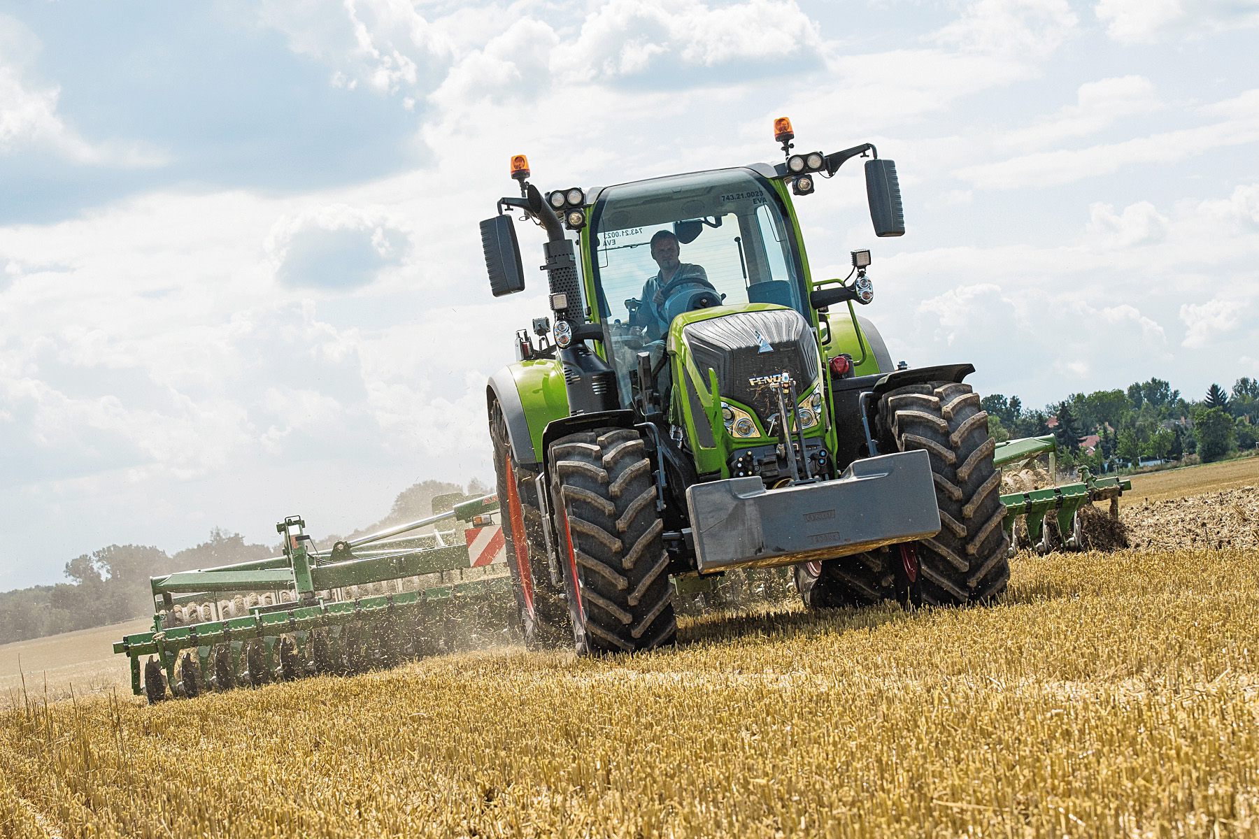 Fendt 700 Vario mit einer Amazone Scheibenegge